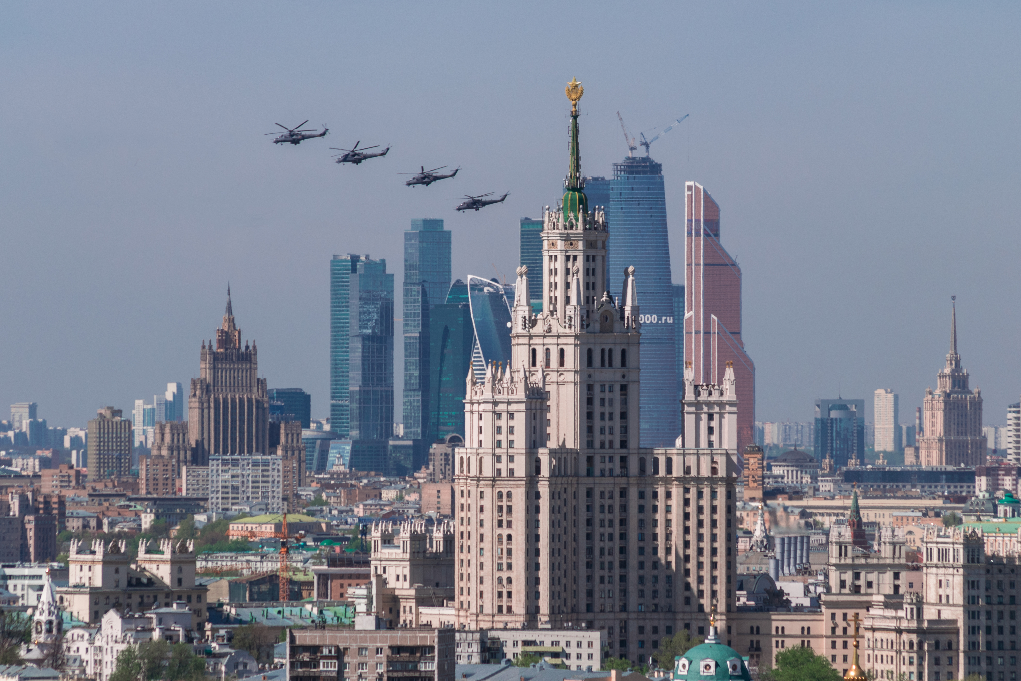 Жилой дом: Котельническая наб., дом 1/15, корпус А, Таганский, Центральный округ, Москва